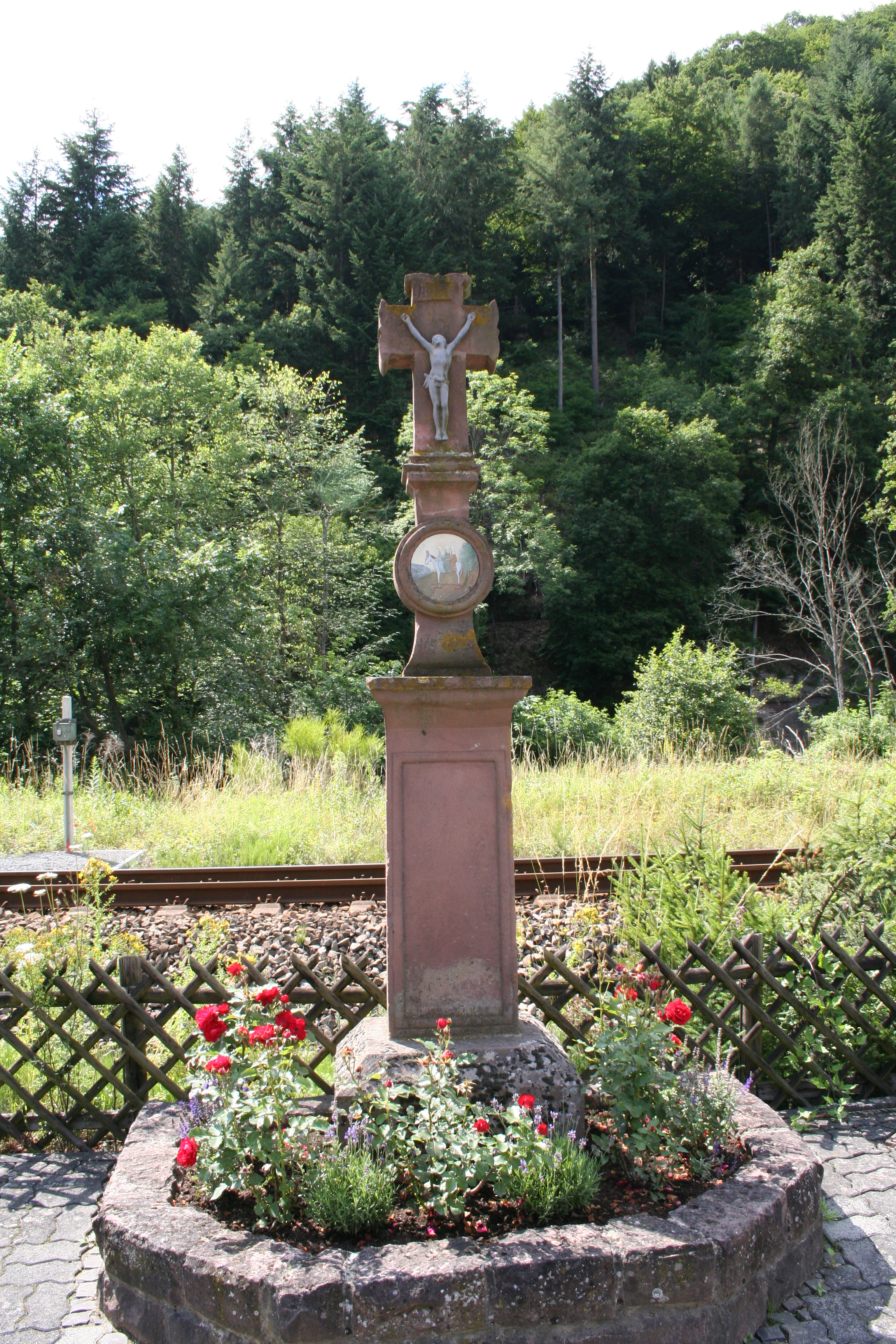 Drei Jungfrauenkreuz in Auw an der Kyll, gegenüber Marienstraße 20, Rheinland-Pfalz, Deutschland